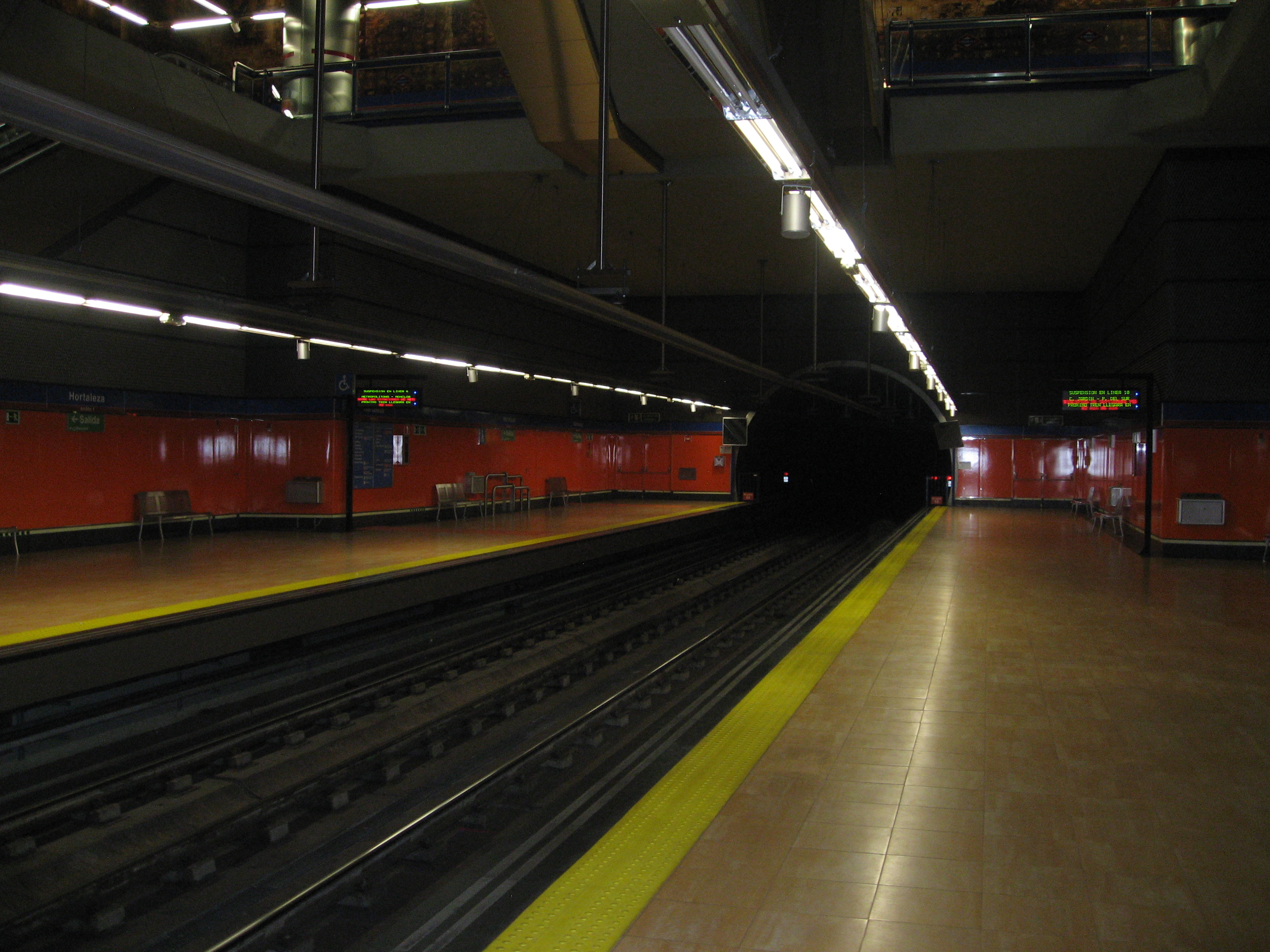 Vista de los andenes de la estación del metro de Hortaleza